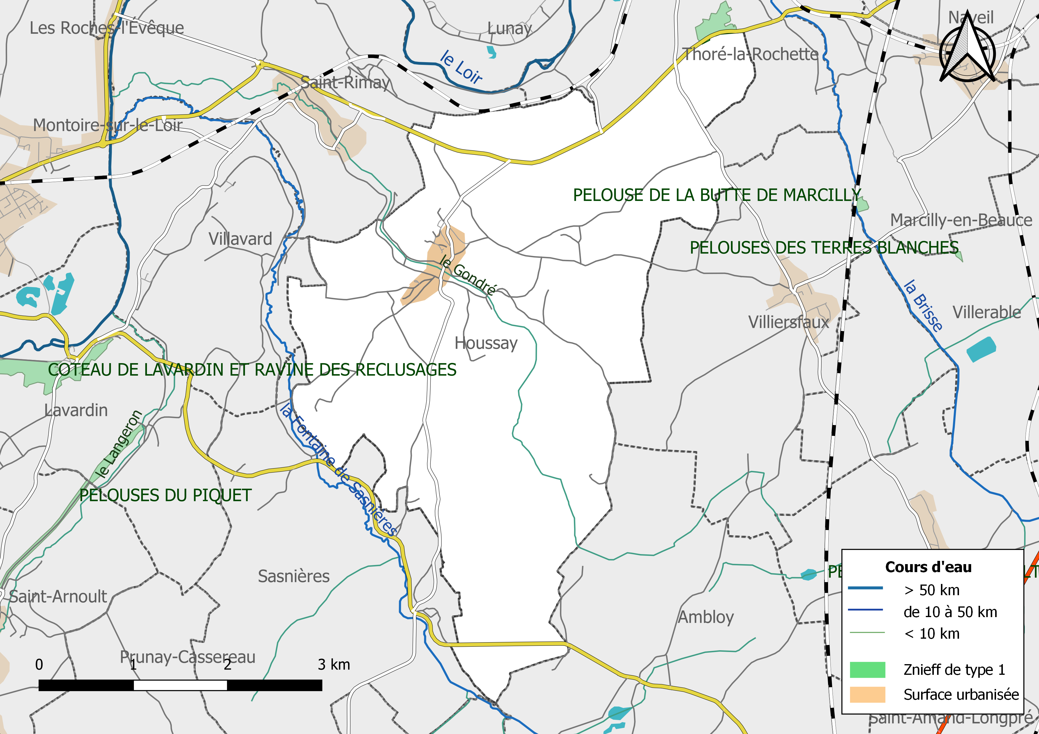 Zones naturelles d'intérêt écologique faunistique et Floristique (ZNIEFF) de type 1 de la commune de Houssay (Loir-et-Cher), France).